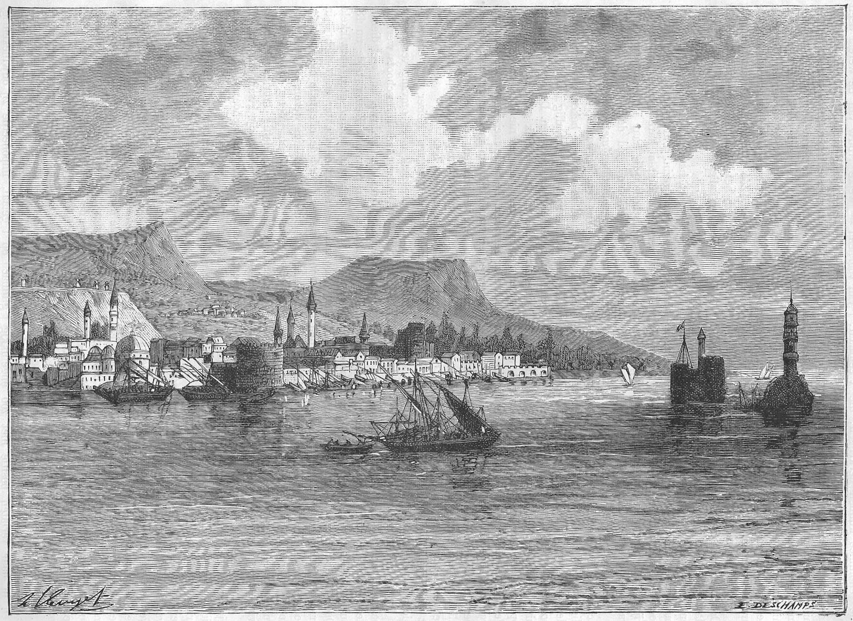 Ansicht des Hafens der Insel Chios, Holzstich (1881)